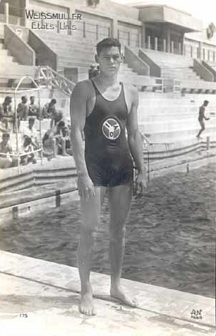 Johnny Weissmuller lors des Jeux Olympiques de 1924 à la Piscine des Tourelles, Avenue Gambetta, Paris, France